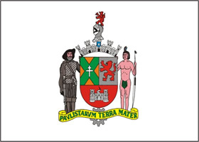 Flag of municipality of São Bernardo do Campo